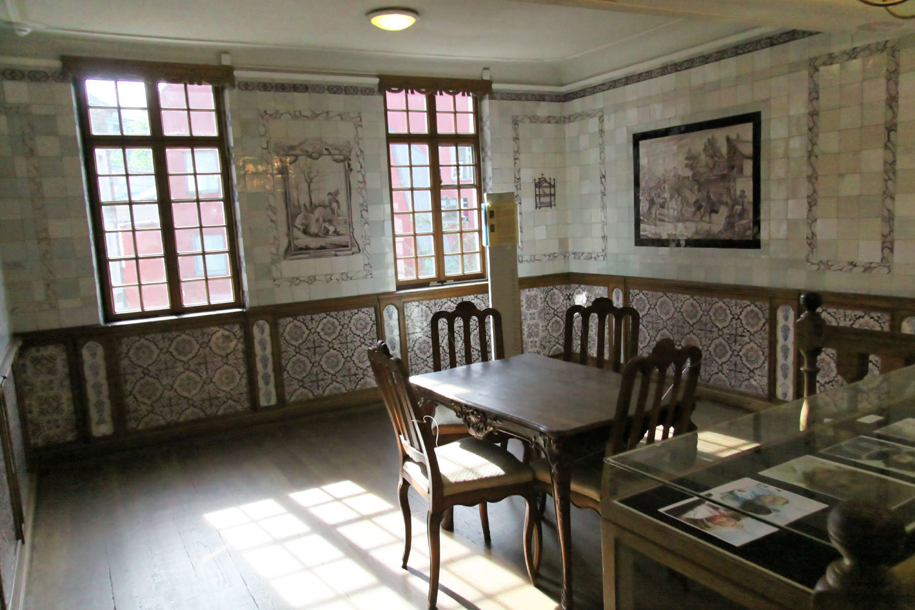 Aachen, Couven-Museum, Oberes Fliesenzimmer